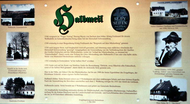 Erläuterungstafel des Erzgebirgszweigvereins Breitenbrunn für den verschwundenen Ort Halbmeil